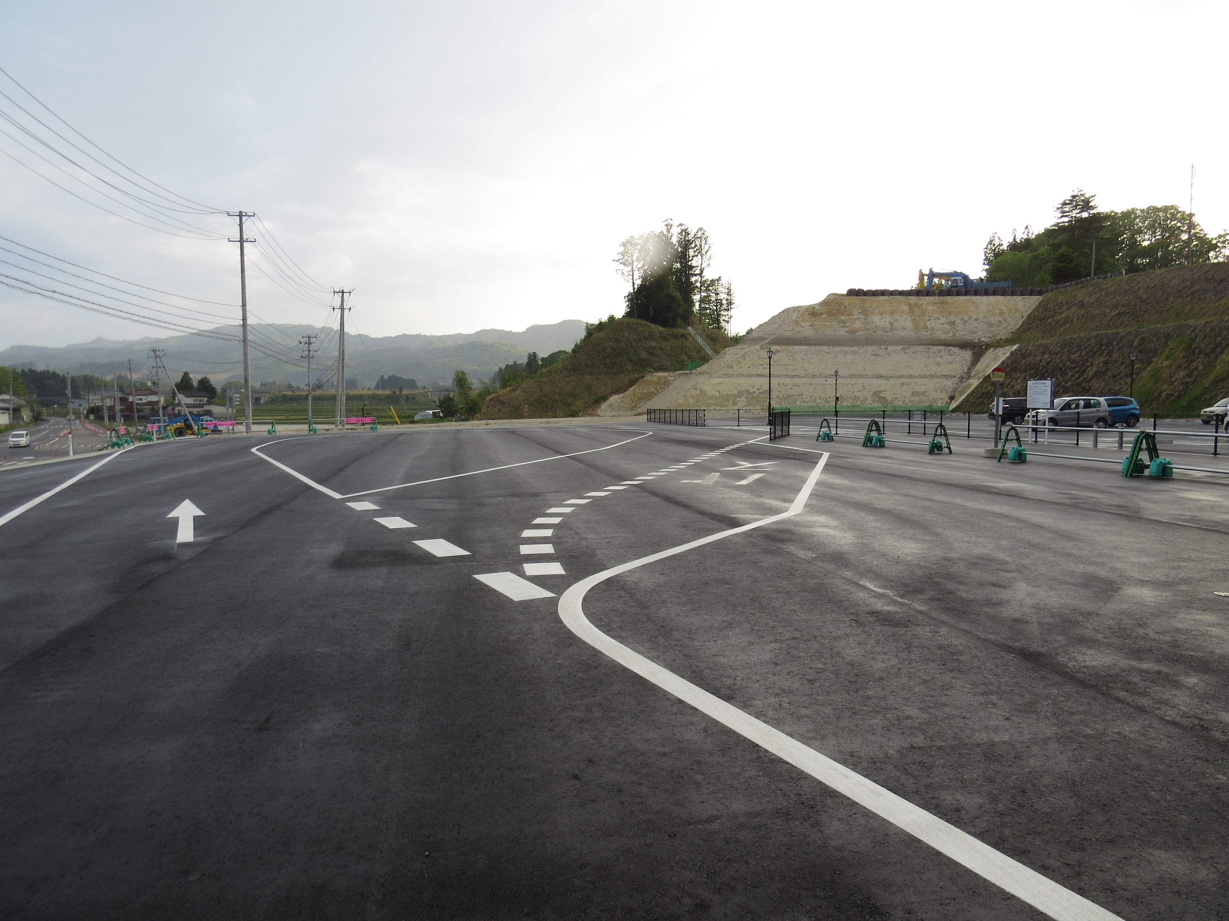 相馬ICに隣接する相馬市バスターミナル